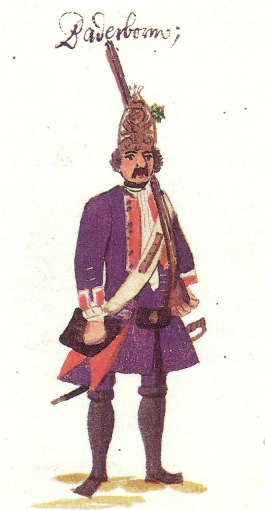 Paderborner Soldat aus der Gudenushandschrift 1734, Generallandesarchiv Karlsruhe